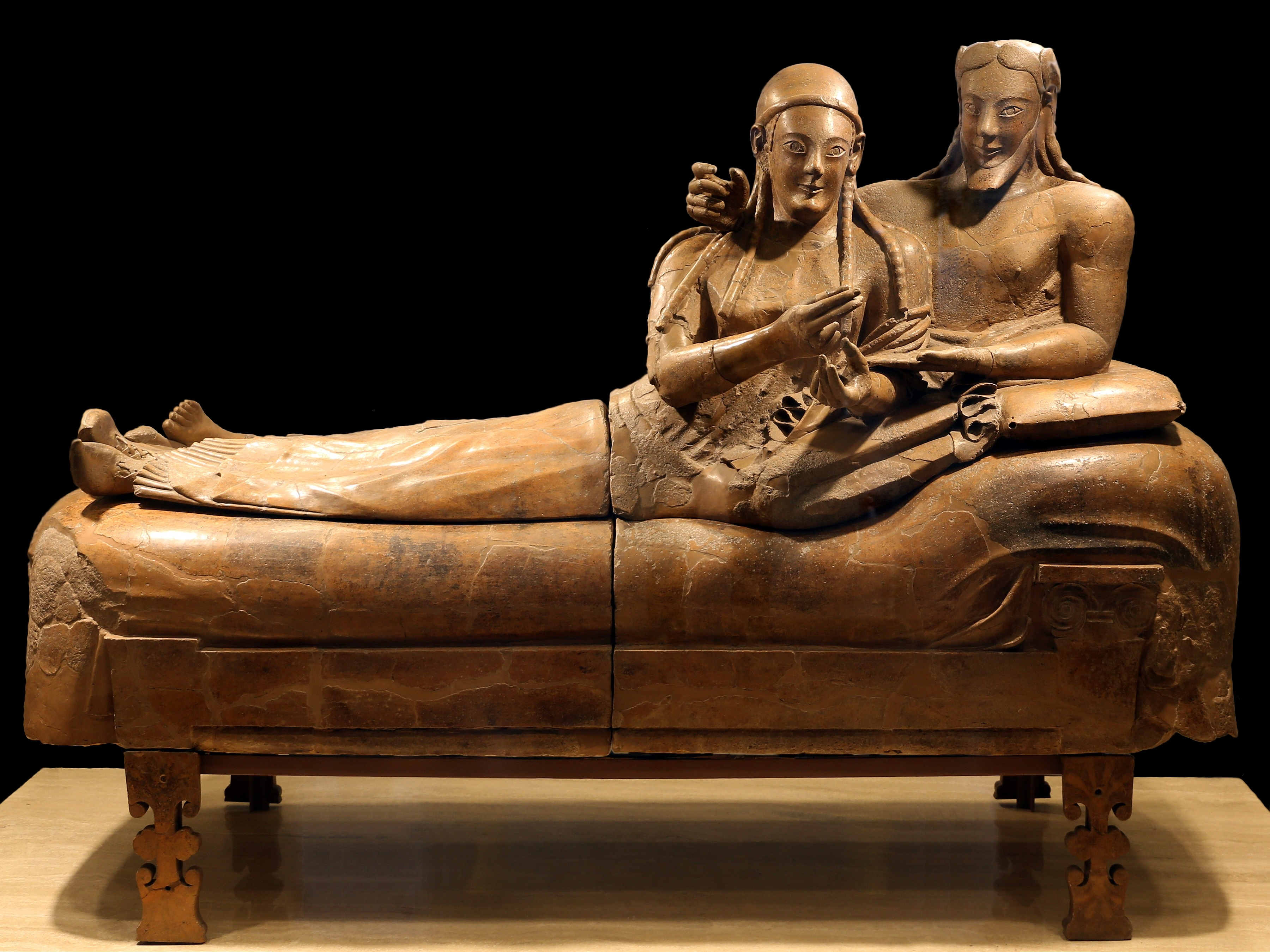 Sarcophagus of the Spouses from Caere, now in the National Etruscan Museum at Villa Giulia in Rome